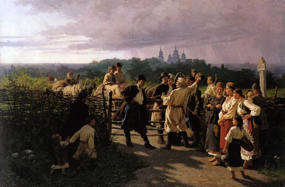 wedding Ransomlabel QS:Len,"wedding Ransom" label QS:Lde,"das Brautgeld" label QS:Lru,"Свадебный выкуп"